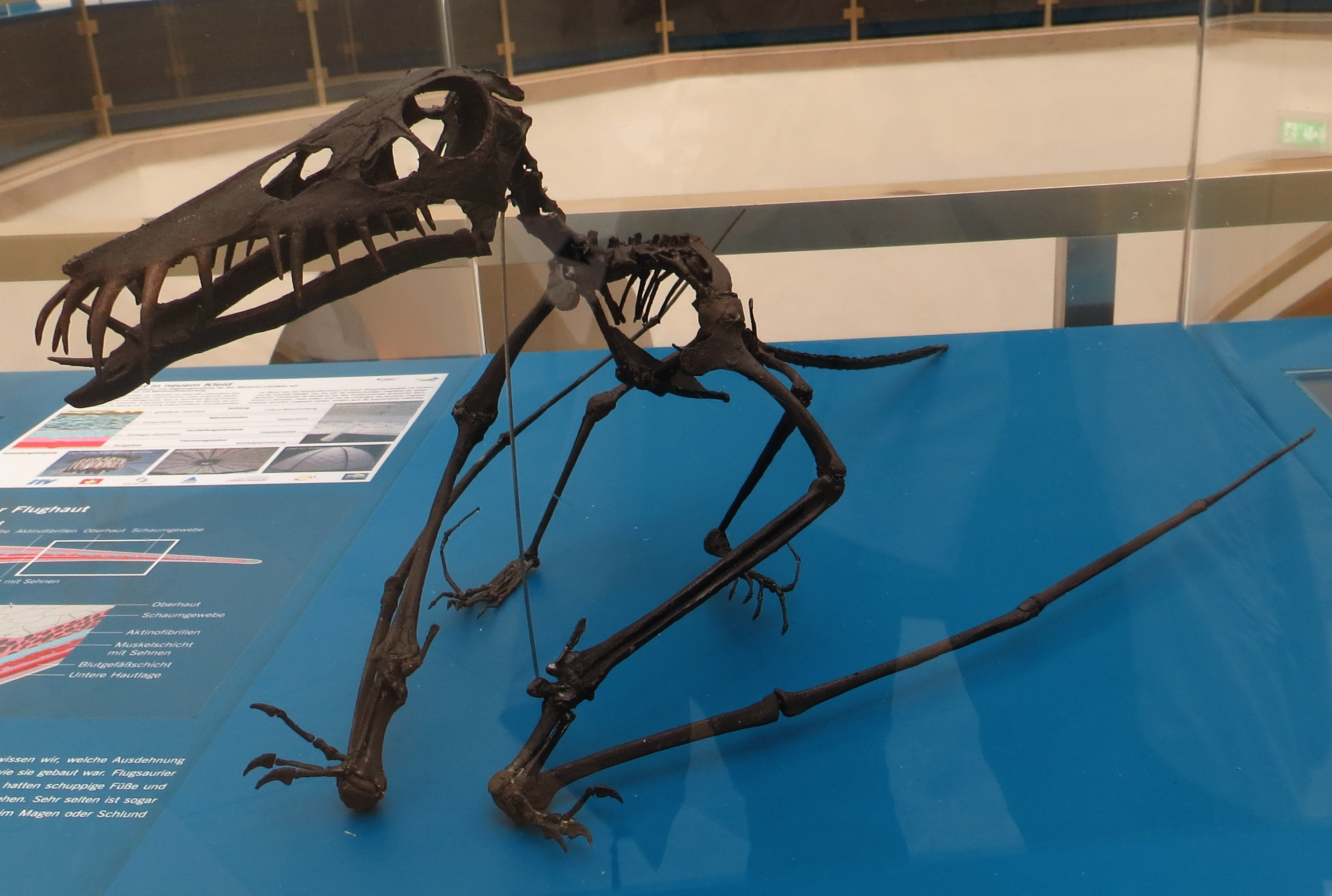 Fossil - Took the picture at Natural History Museum, Karlsruhe